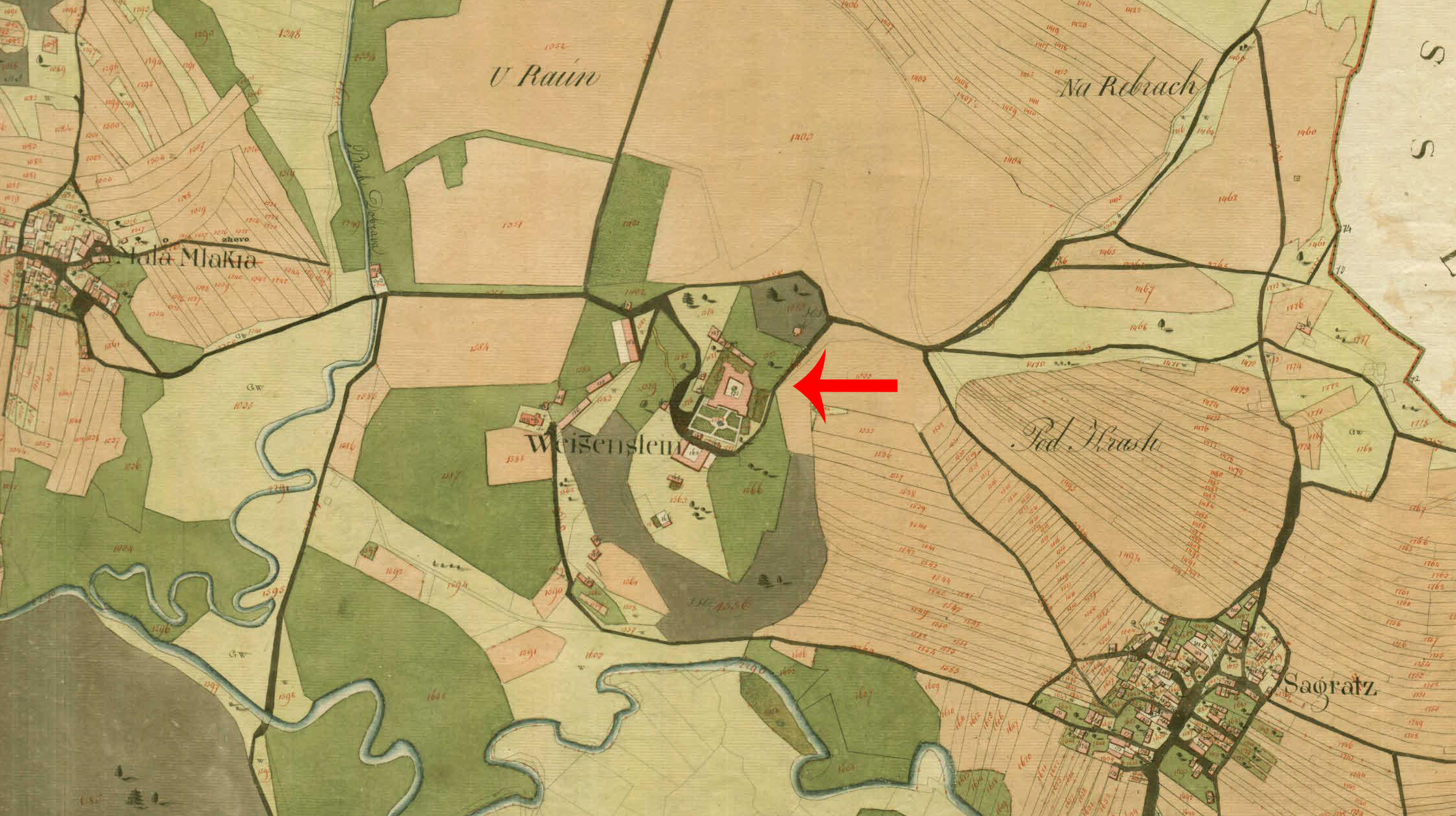 Franciscejski kataster za Kranjsko, 1823-1869